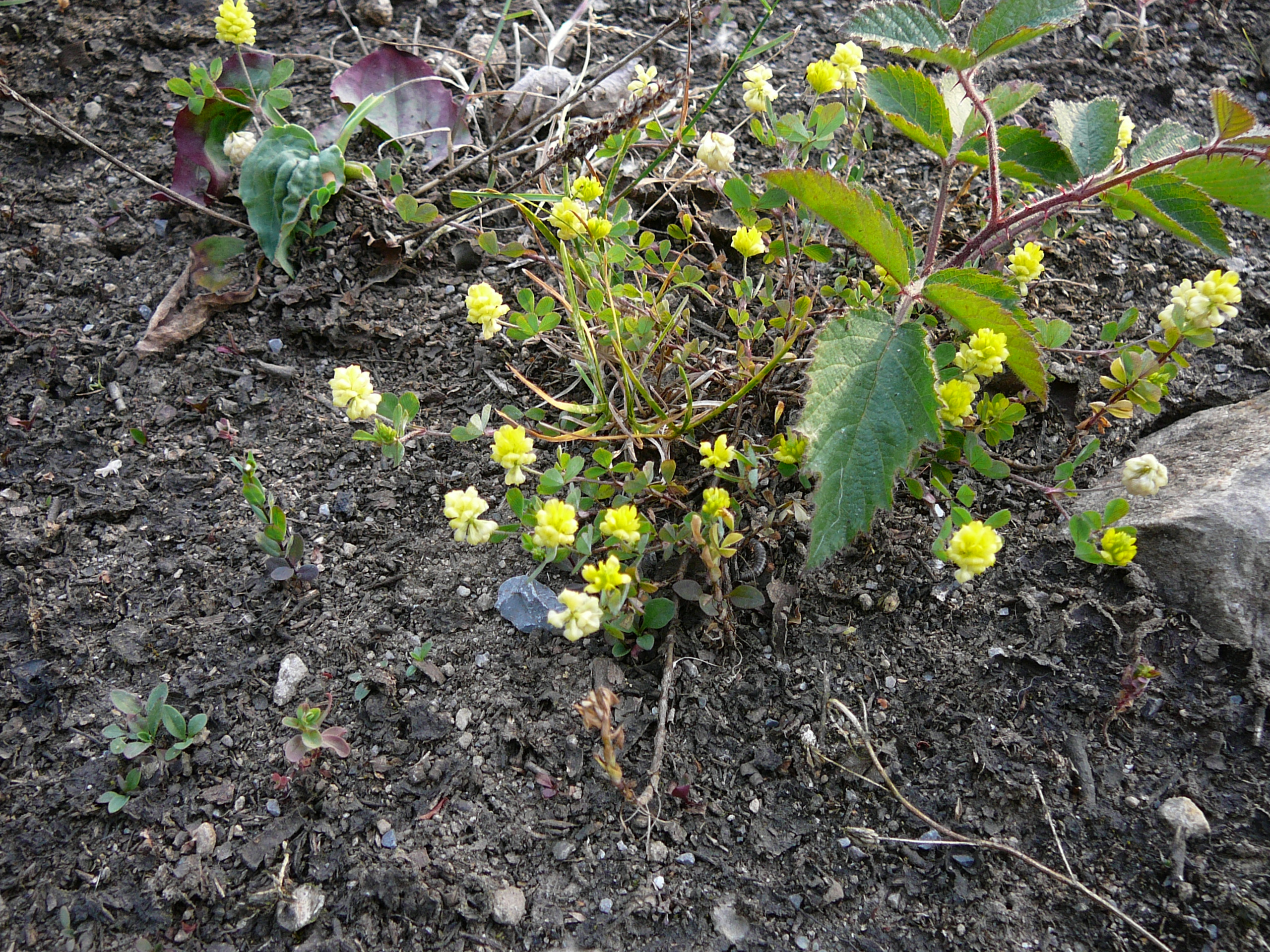 Trifolium campestre